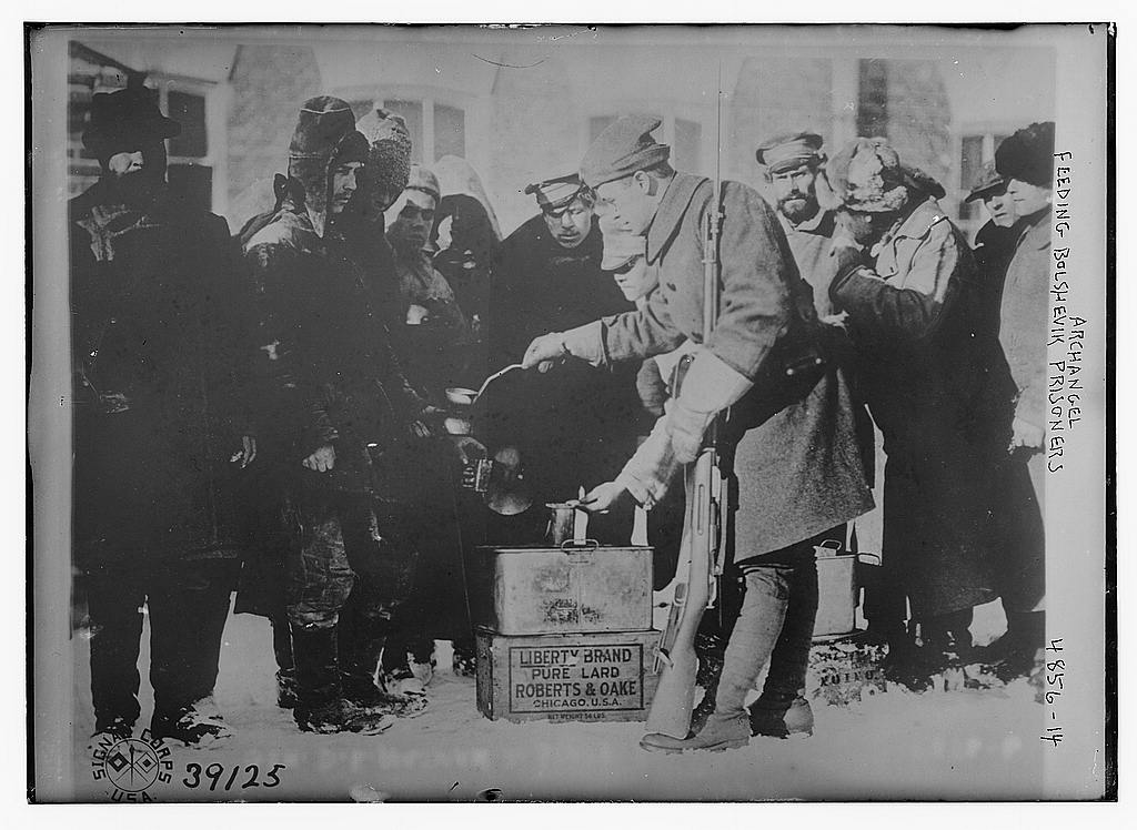 Aleimentando prisioneros bolcheviques en Arjángelsk durante la intervención Aliada en la Guerra Civil Rusa.